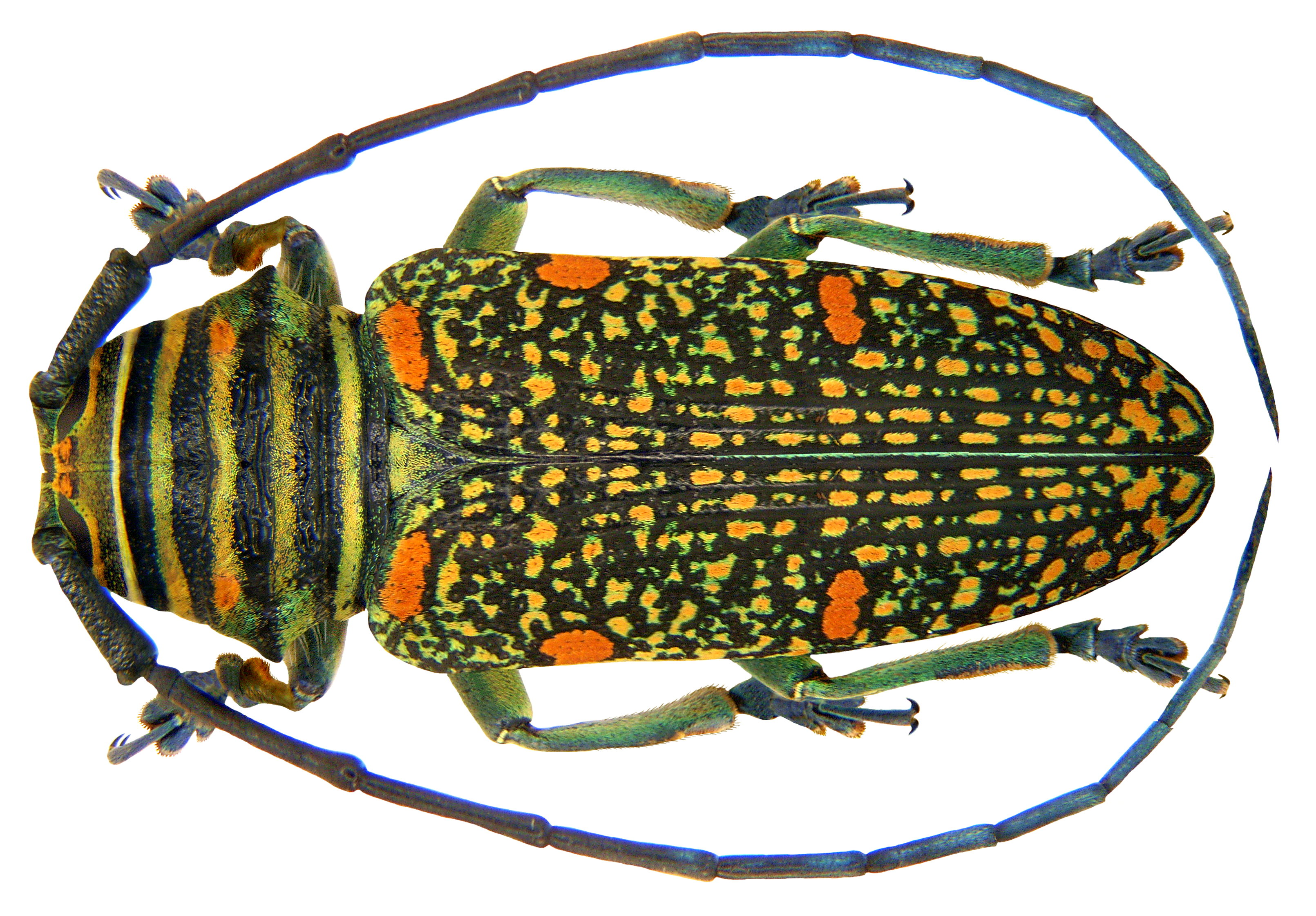 Familie: Cerambycidae Groesse: 27 mm Fundort: Senegal, Cap Skirrung leg.det. U.Schmidt, 1990 Photo: U.Schmidt, 2009